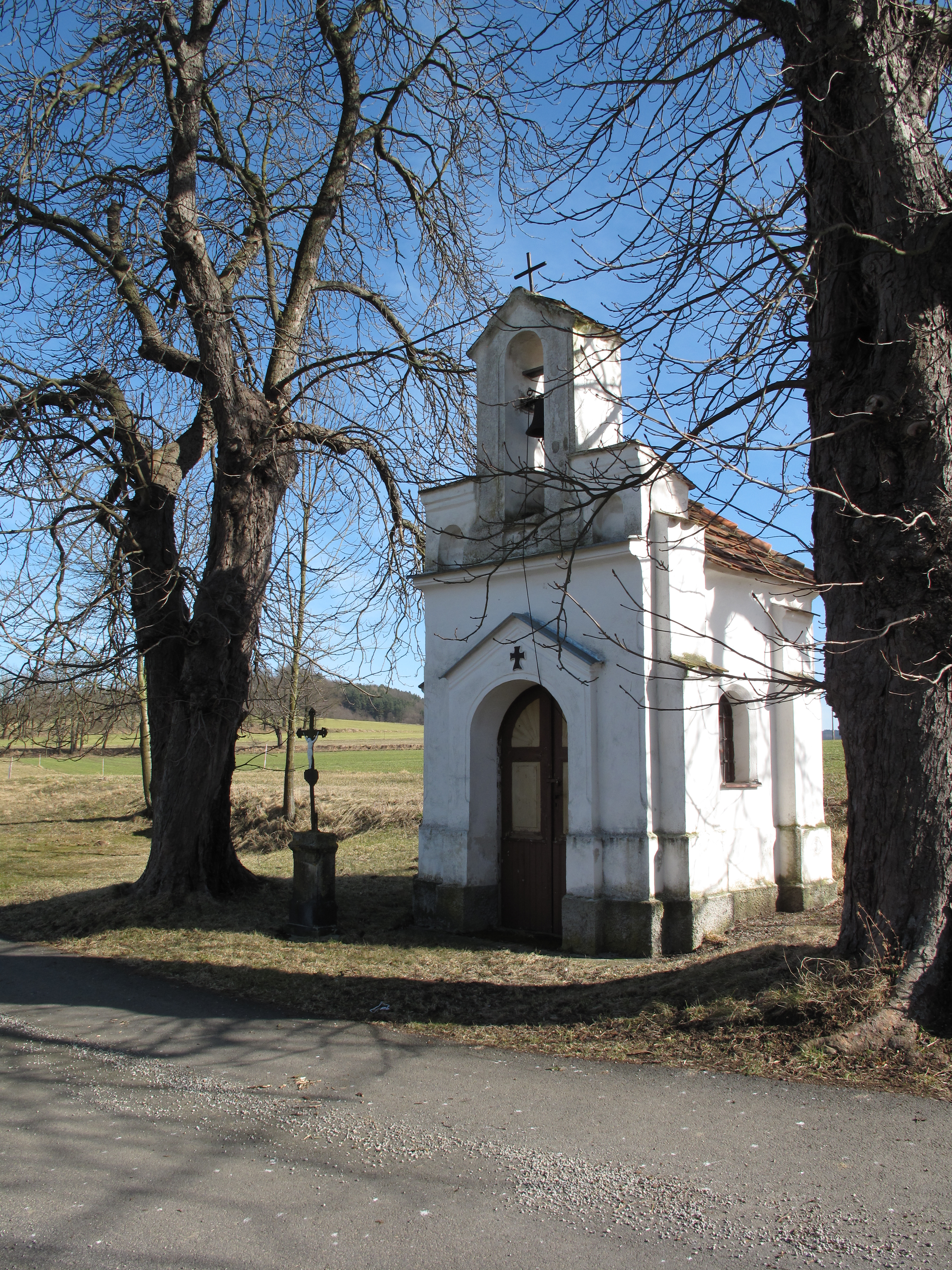 Kaplička v Blaničce. Okres Prachatice, Česká republika.